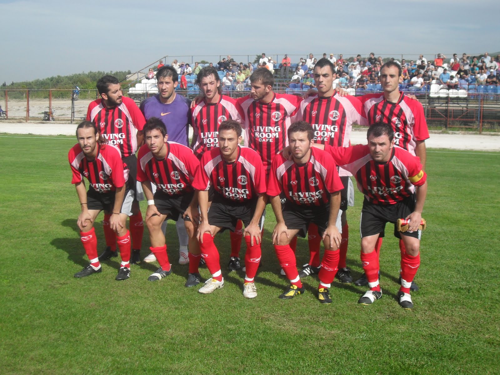 Χιλιομοδι